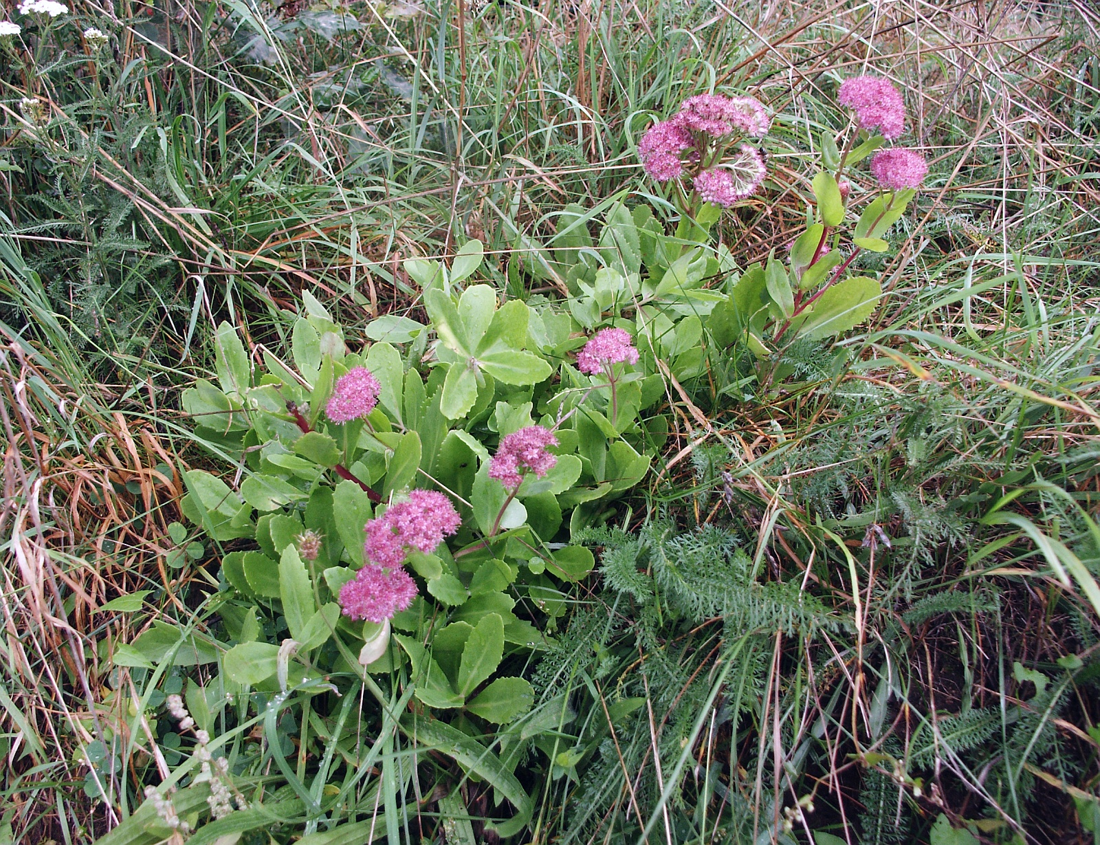 Sedum telephium,Virngrund, Germany